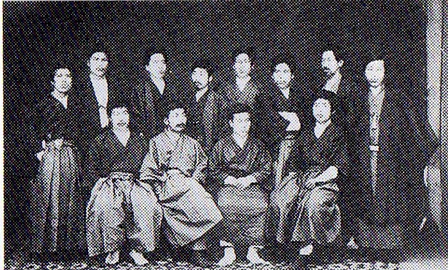 同志社英学校の第一回卒業式、全員が熊本バンド